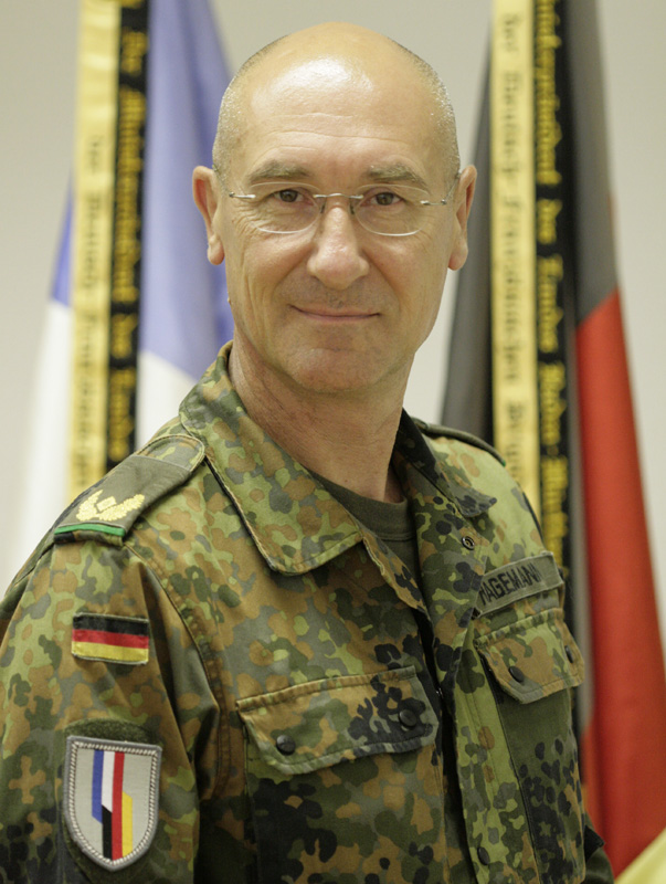 Photo du Général commandant actuellement la BFA